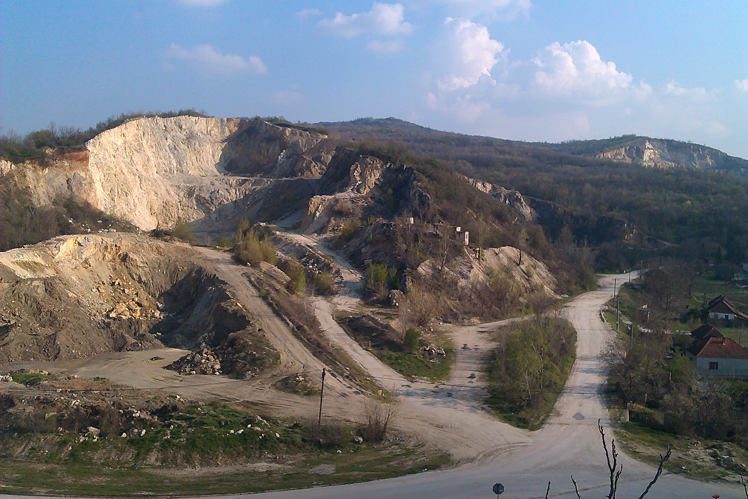 Srpski (latinica): Jedan od kopova u Gradcu